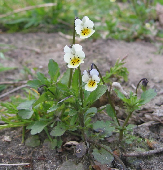 zelfgemaakte foto; akkerviooltje in april in de moestuin. Categorie:Afbeelding plant